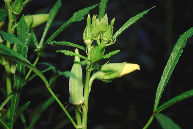 Abelmoschus esculentus, aka okra. Image Number: 96cs2482 CD3035-43